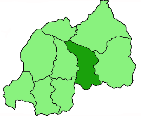 Mappa dell'arcidiocesi cattolica di Kigali, in Ruanda. Anno 2009.